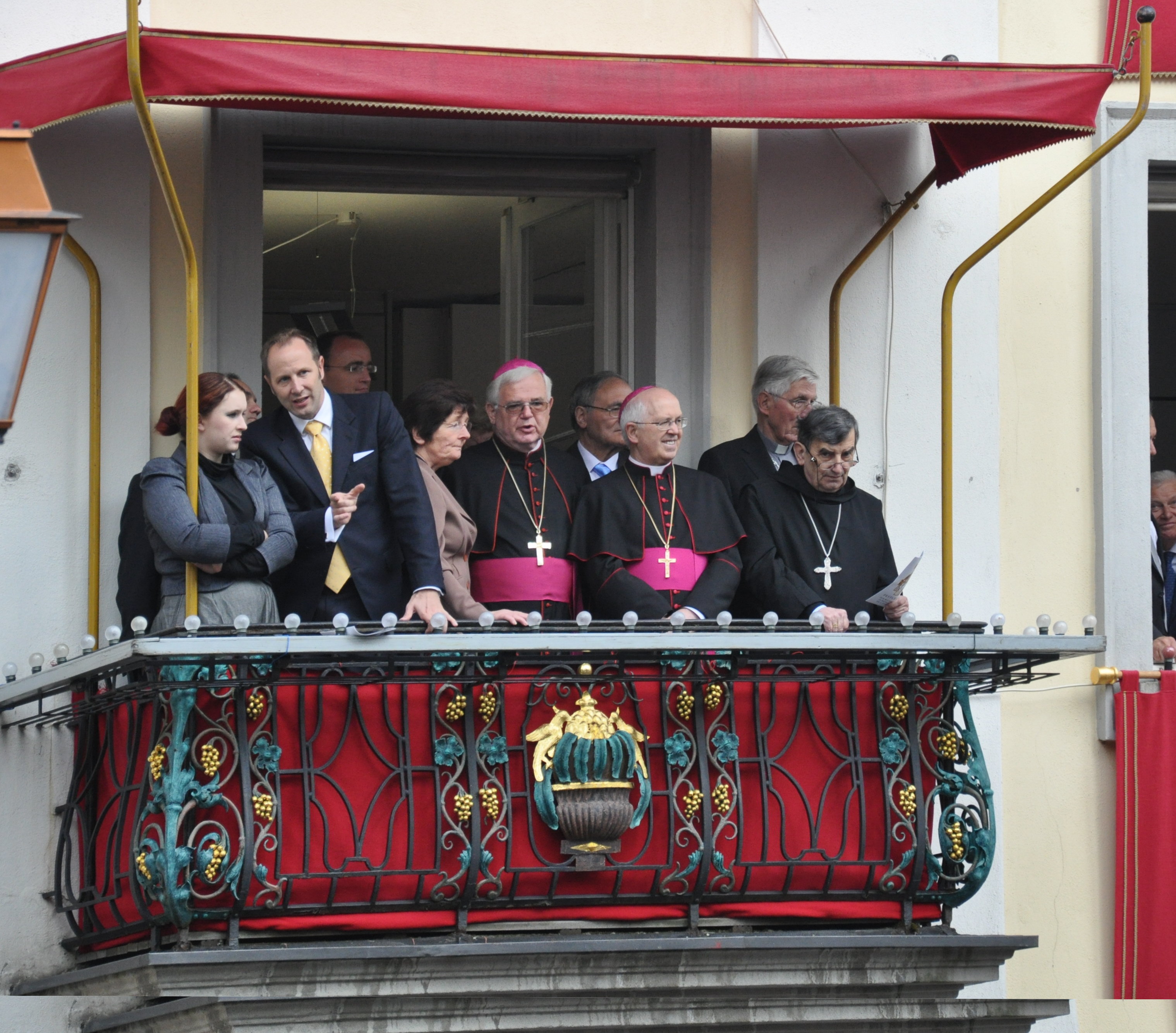 Weingarten, Blutritt 2011, Ehrengäste auf dem Rathausbalkon, darunter Agnes Malczak (MdB), Daniel Rapp (Oberbürgermeister von Ravensburg), Julián Barrio Barrio (Erzbischof von Santiago de Compostela), Johannes Kreidler (Weihbischof der Diözese Rottenburg-Stuttgart)